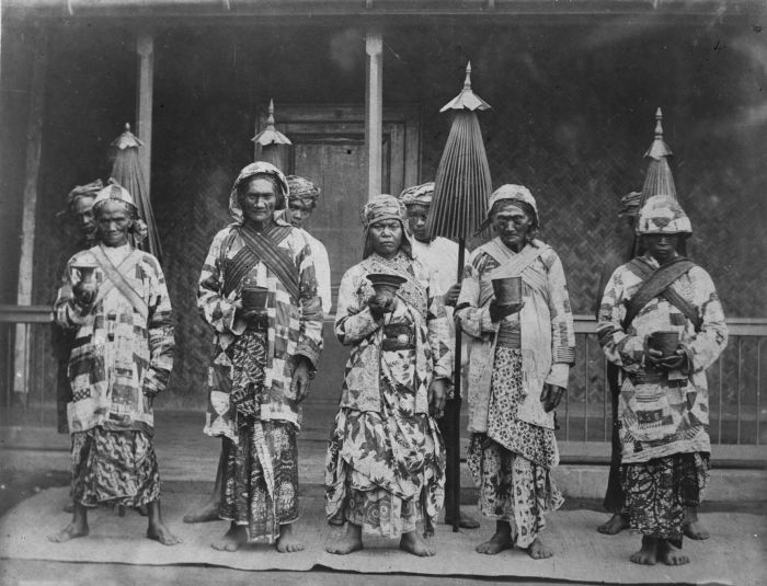 Foto. Hindoeïstische priesters uit de omgeving van Tenger. Java